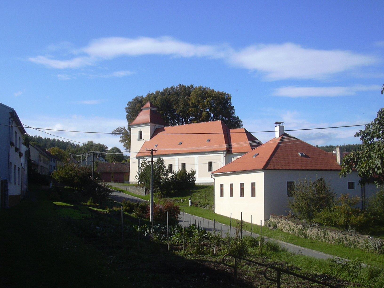 Farní kostel Nanebevzetí Panny Marie Rychtářov (Vyškov- Czech republic)